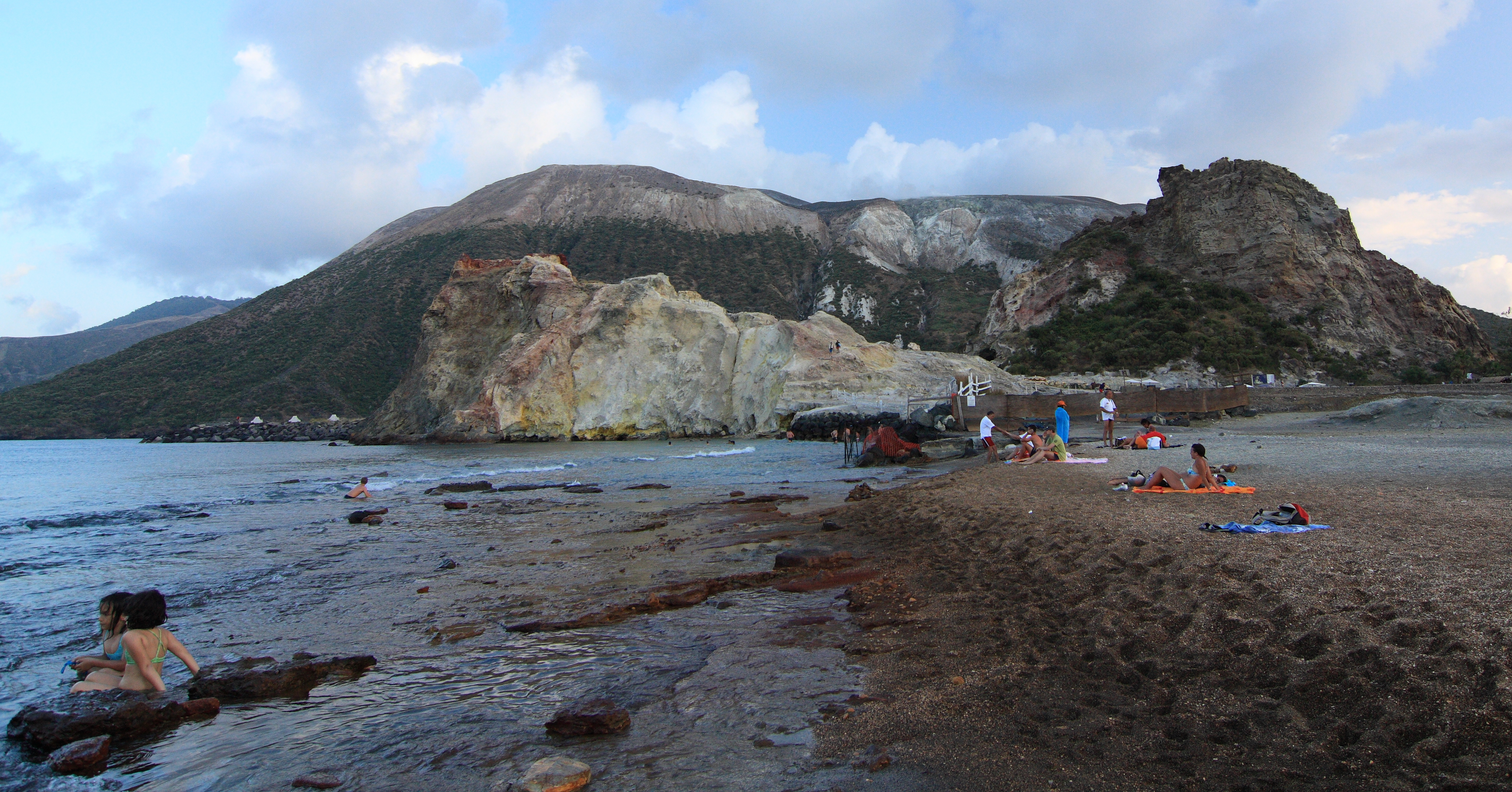 Isola di Vulcano